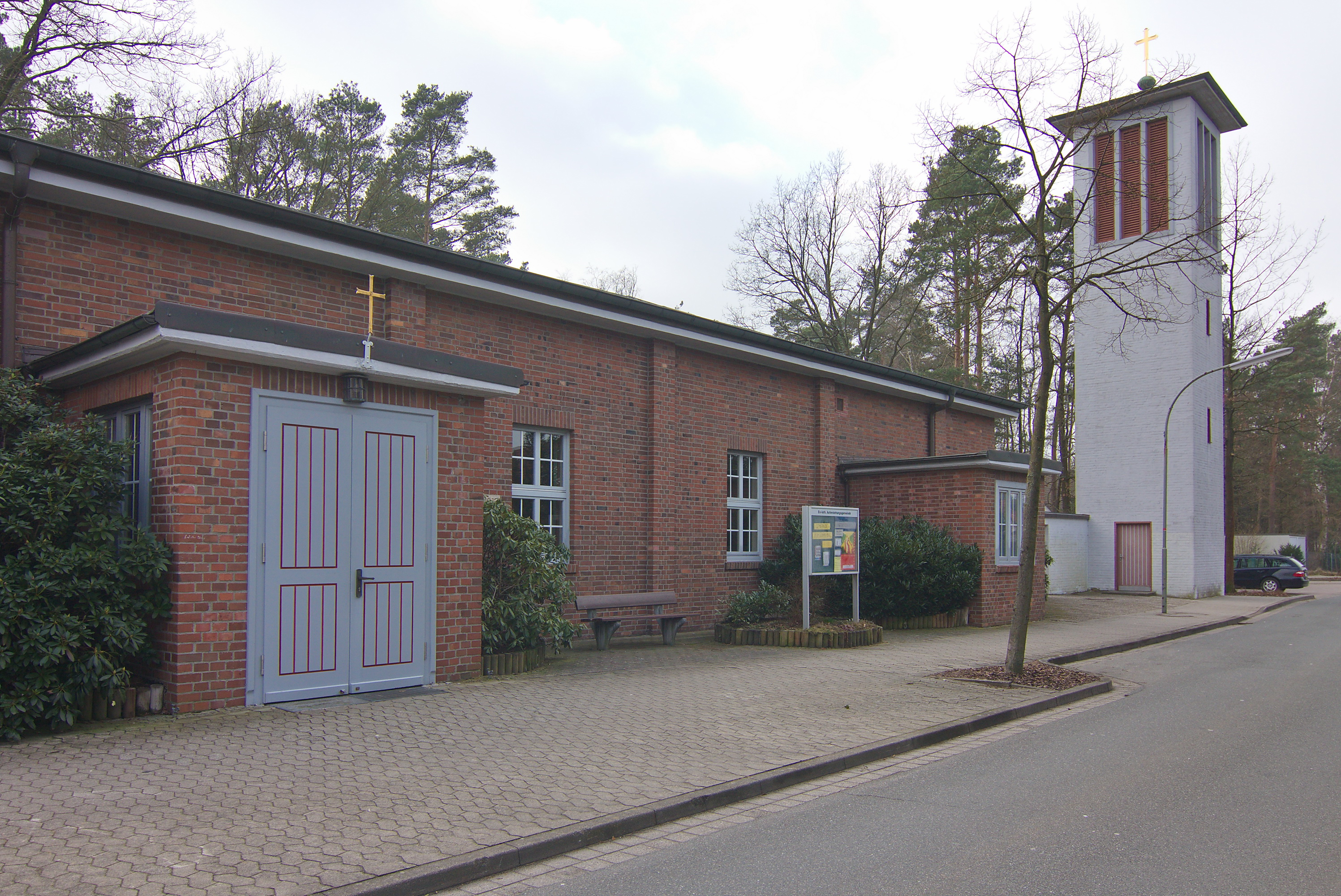 Auferstehungskirche in Hambühren, Niedersachsen, Deutschland.